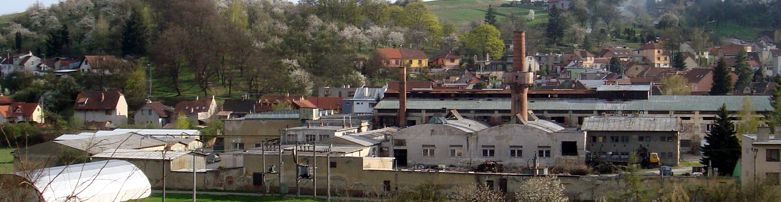 Rosice-bývalá sklárna